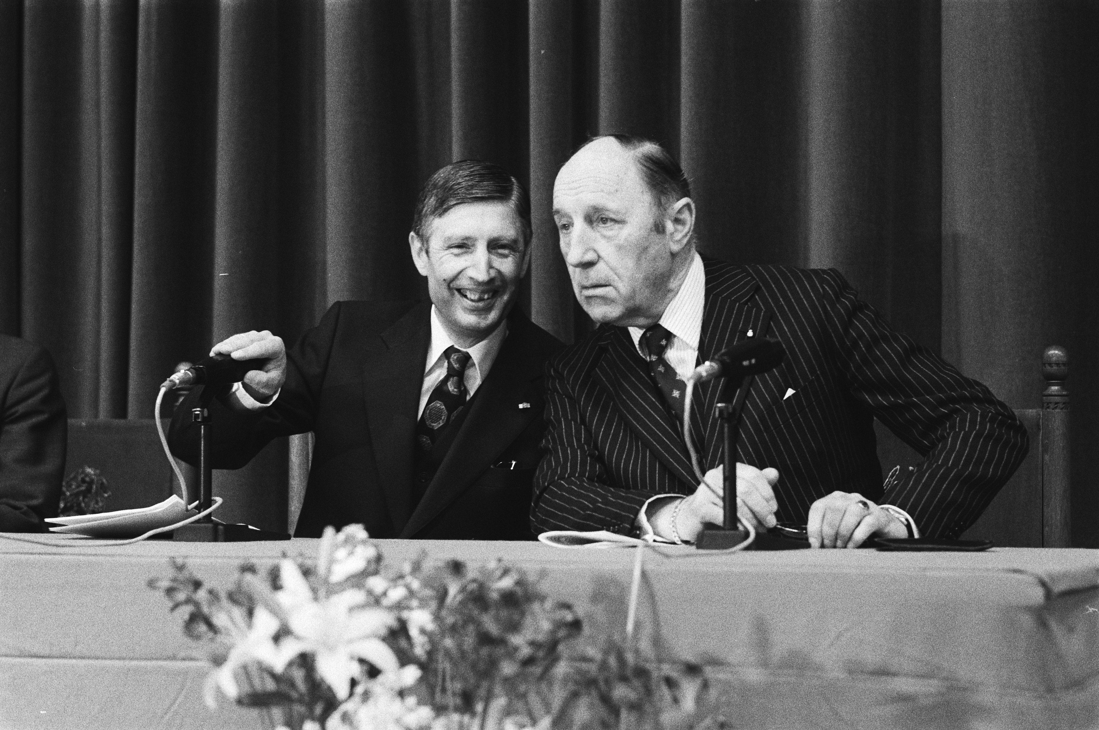 Collectie / Archief : Fotocollectie Anefo Reportage / Serie : Openingsceremonie van de NAVO Ministerraad 1979 in de Ridderzaal in Den Haag Beschrijving : Van Agt (links) en Luns Datum : 30 mei 1979 Locatie : Den Haag, Zuid-Holland Trefwoorden : groepsportretten, ministers-presidenten, secretarissen-generaal, vergaderingen Persoonsnaam : Agt, Dries van Fotograaf : Croes, Rob C. / Anefo Auteursrechthebbende : Nationaal Archief Materiaalsoort : Negatief (zwart/wit) Nummer archiefinventaris : bekijk toegang 2.24.01.05 Bestanddeelnummer : 930-2905